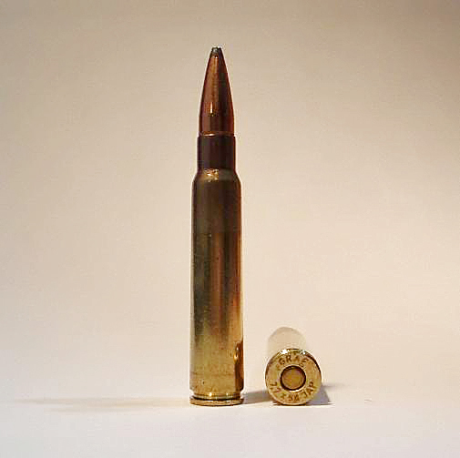 7.7 x 58 JAP